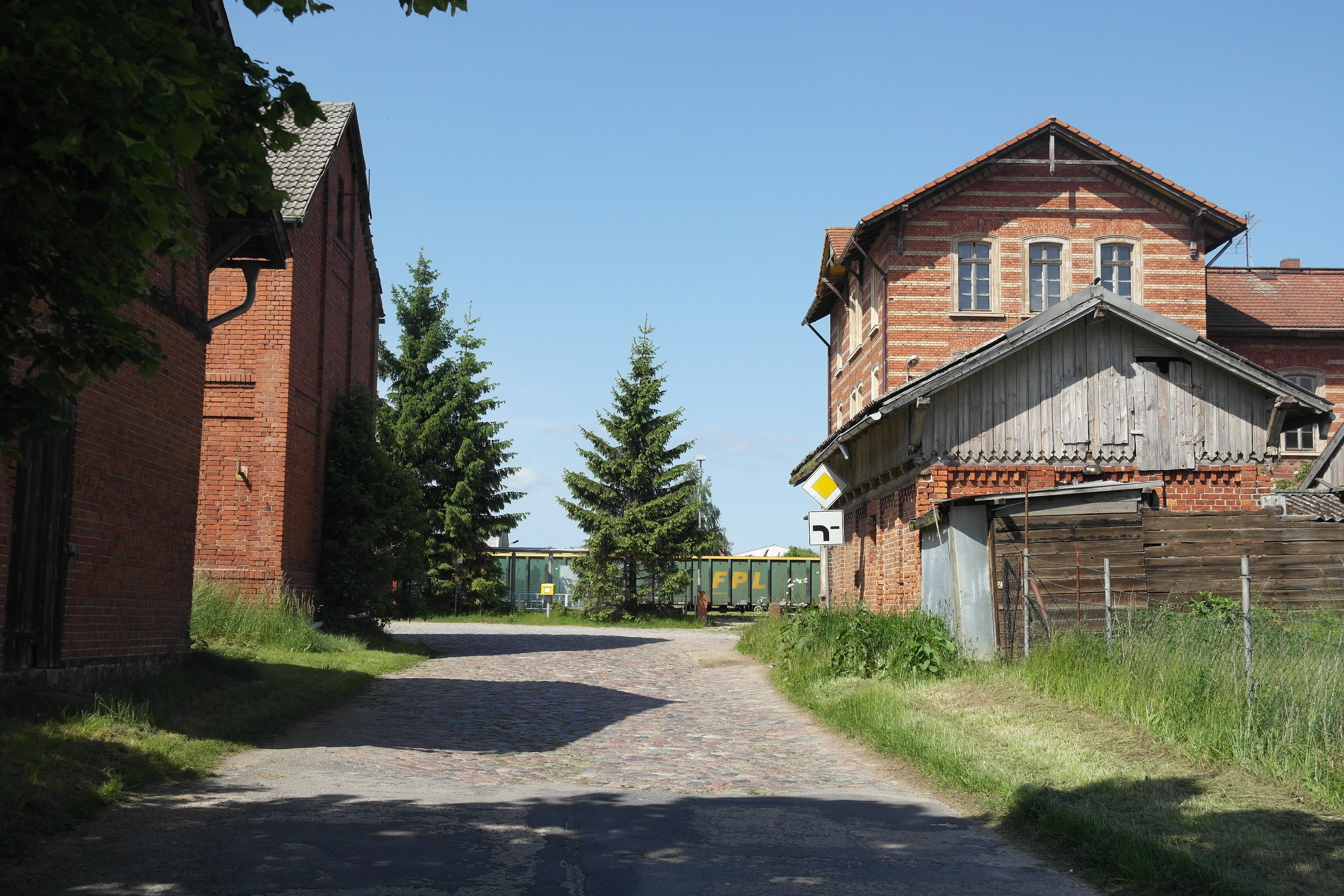 Oertzenhof, Bahnhofsensemble. Rechts hinten Bf., davor Nebengebäude von Haus 25, links Haus 27 mit Nebengebäuden. Alle Häuser sind denkmalgeschützt.